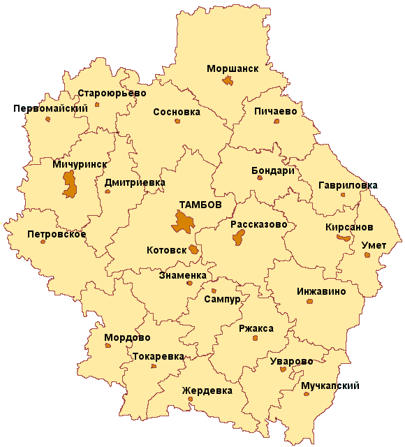 Карта районов Тамбовской области с русскими подписями